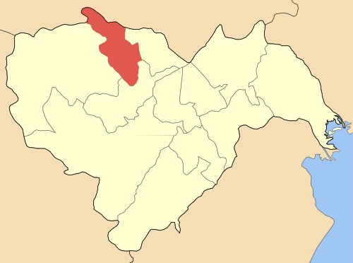 Дем Антемия на картата на Ном Иматия, Гърция. Locator map of Anthemion municipality (Δήμος Ανθεμίων) at Imathias perfecture, Greece.